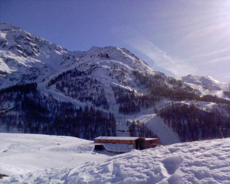 Piste di sci di Madesimo. Foto scattata da Fiore. Piste di sci di Madesimo. Foto scattata da Fiore.